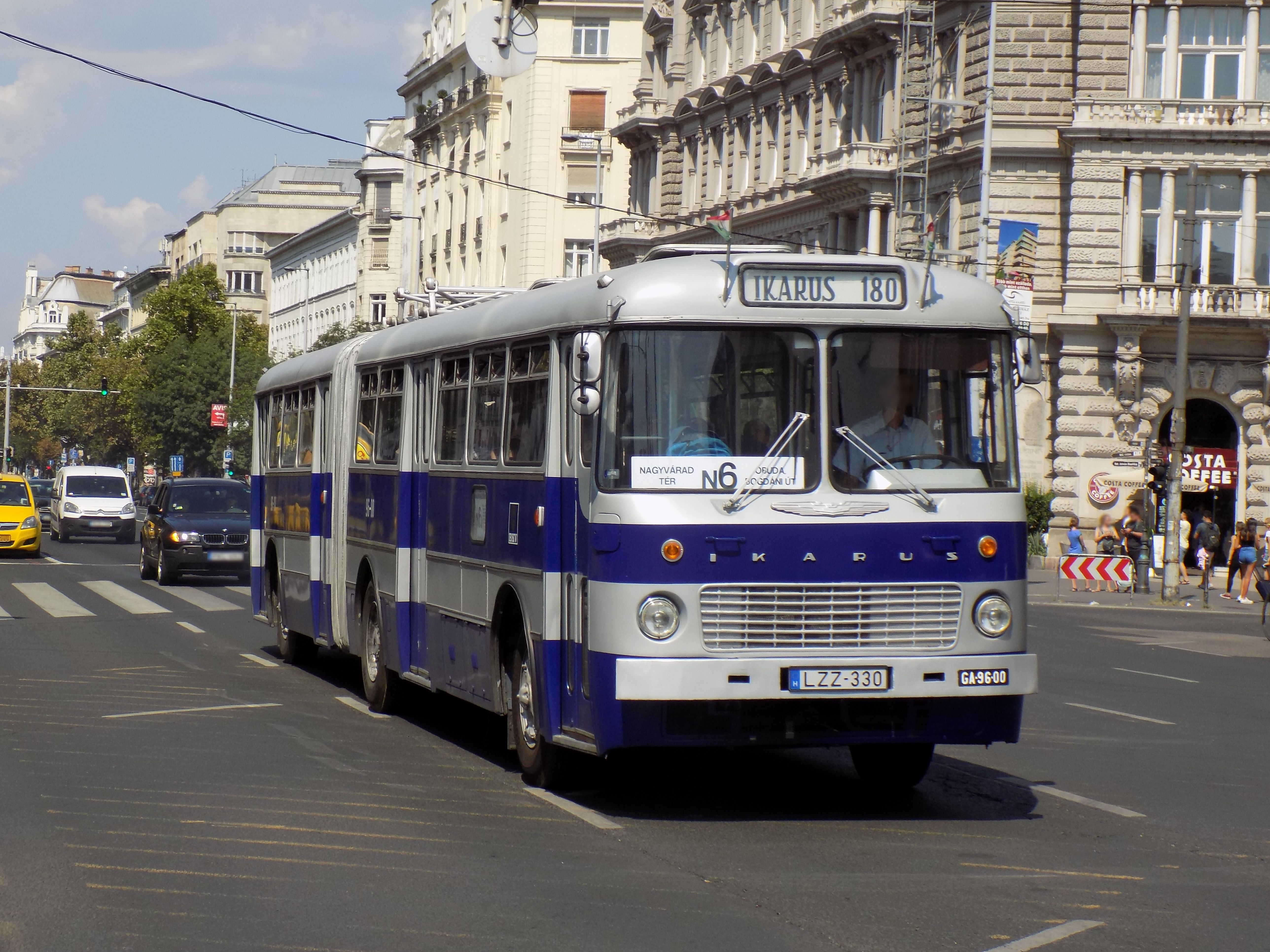 Ikarus 180-as busz az N6-os jelzésű nosztalgiajáraton a BKV 50 éves évfordulóján szervezett rendezvénysorozat részeként (Deák Ferenc tér)